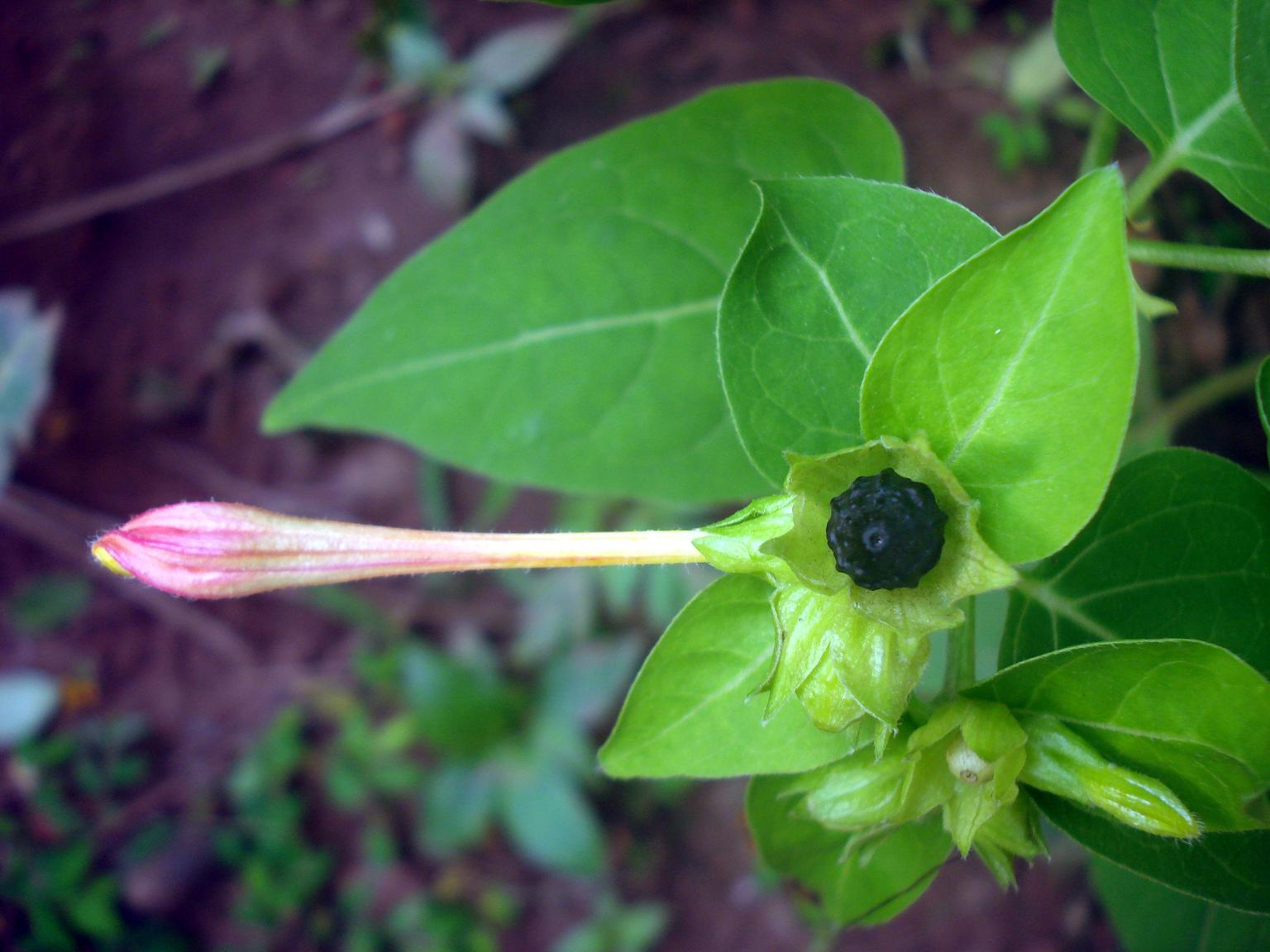 4 o’ clock flower bud and seed Mirabilis jalapa നാല് മണിചെടിയുടെ പൂമൊട്ടും വിത്തും